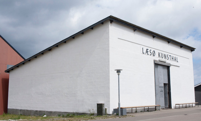 Læsø Kunsthal 2016